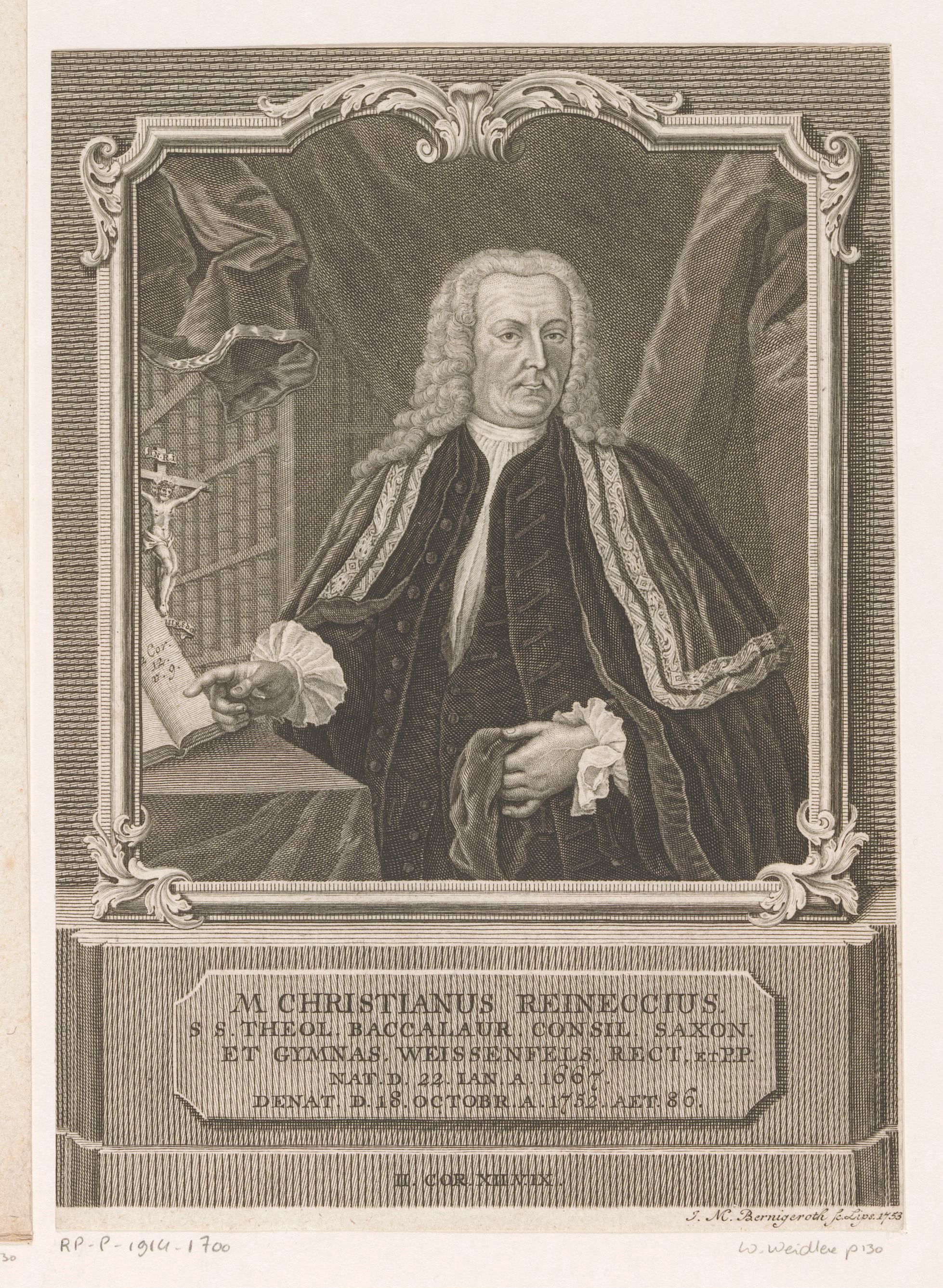 IdentificatieTitel(s): Portret van Christian ReinecciusObjecttype: prent Objectnummer: RP-P-1914-1700Catalogusreferentie: HAB A 17409Opschriften / Merken: verzamelaarsmerk, verso, gestempeld: Lugt 2228VervaardigingVervaardiger: prentmaker: Johann Martin Bernigeroth (vermeld op object)Plaats vervaardiging: LeipzigDatering: 1753Fysieke kenmerken: gravureMateriaal: papier Techniek: graveren (drukprocedé) / stippelwerkAfmetingen: blad: h 194 mm (binnen de plaatrand afgesneden) × b 138 mm (binnen de plaatrand afgesneden)OnderwerpWat: historical personsbookshelvesboard, dignitaries of a universitycrucifix ~ personal devotionthe Bible as a bookWie: Christian ReinecciusVerwerving en rechtenVerwerving: aankoop 1905Copyright: Publiek domein